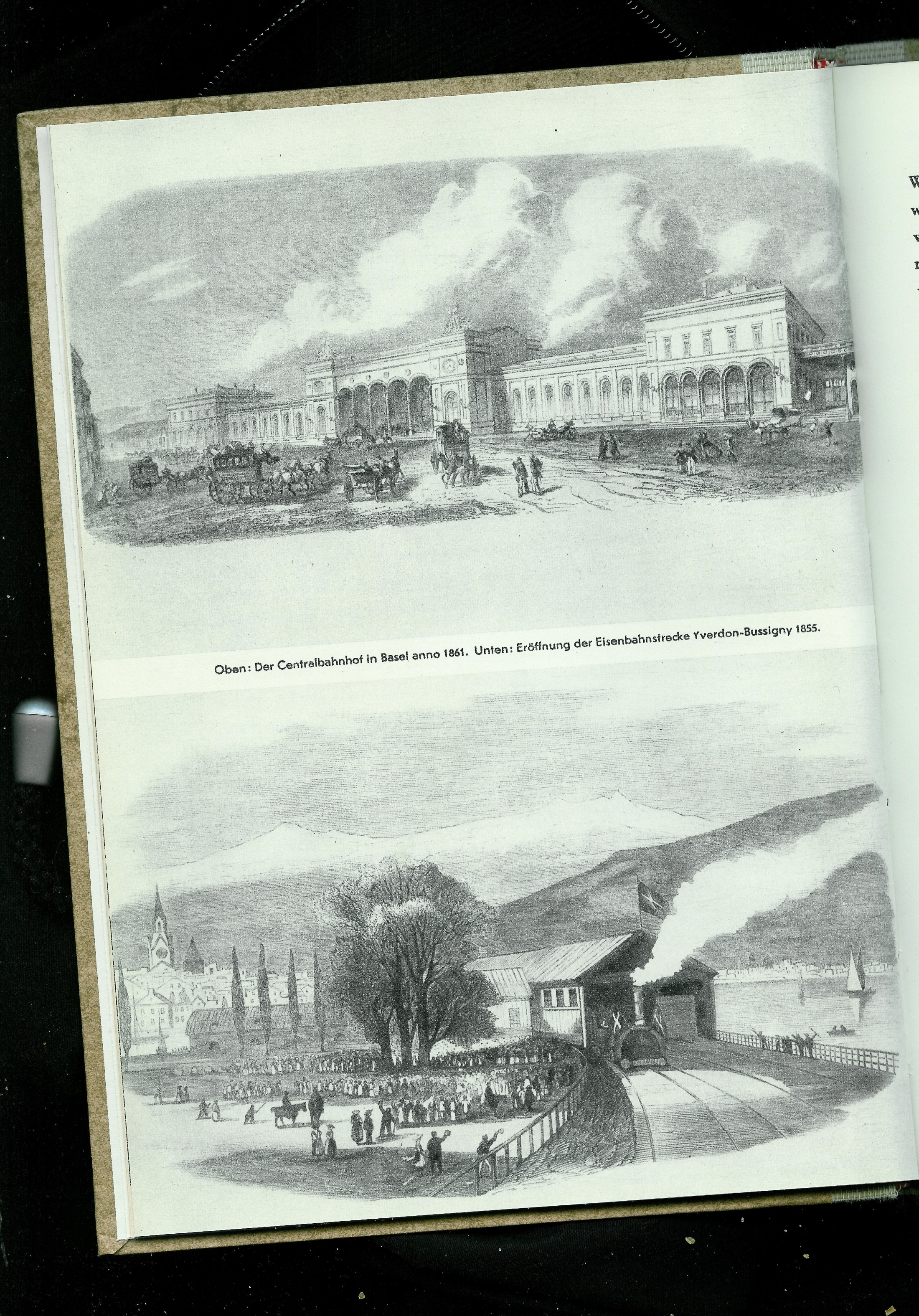 o: Der Centralbahnhof in Basel, 1861 u: Eröffnung der Eisenbahnstrecke Yverdon-Bussigny, 1855